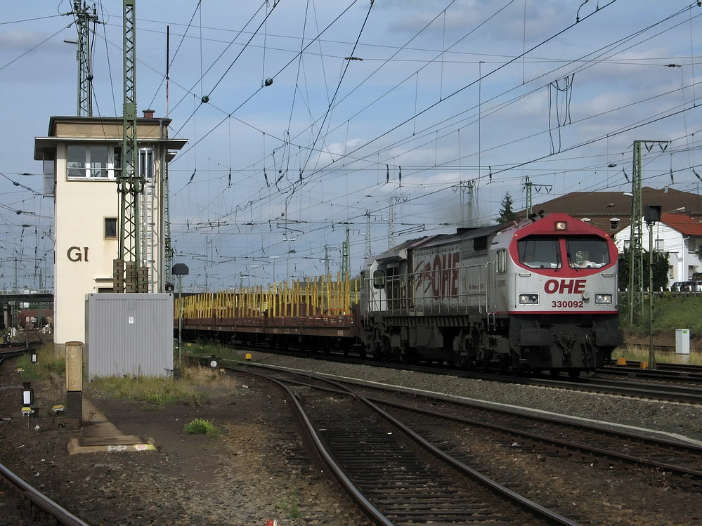 OHE 330092 am 03.09.2008 in Giessen